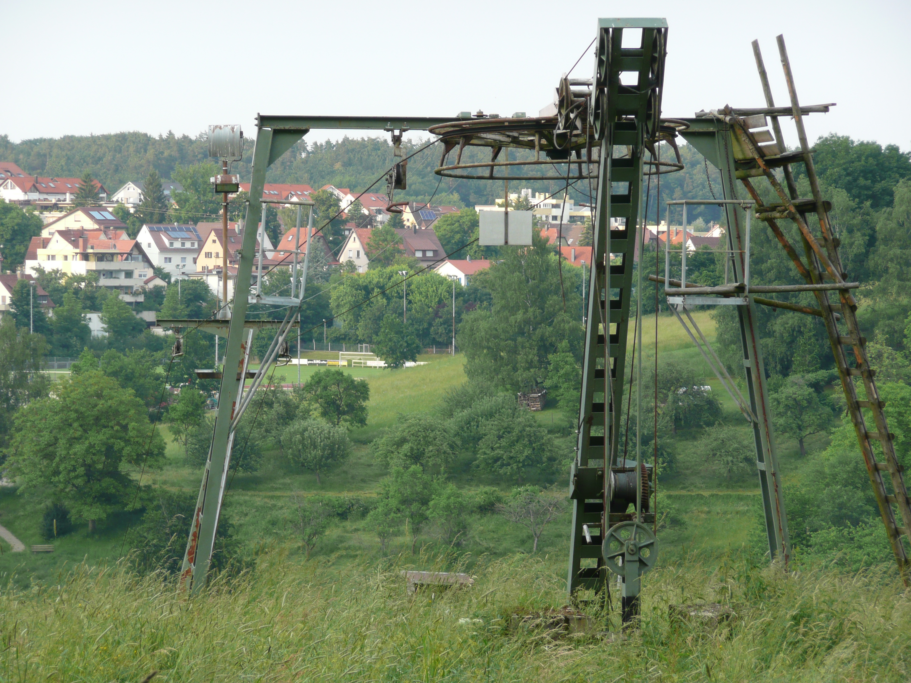 Skilift PizMus in Musberg